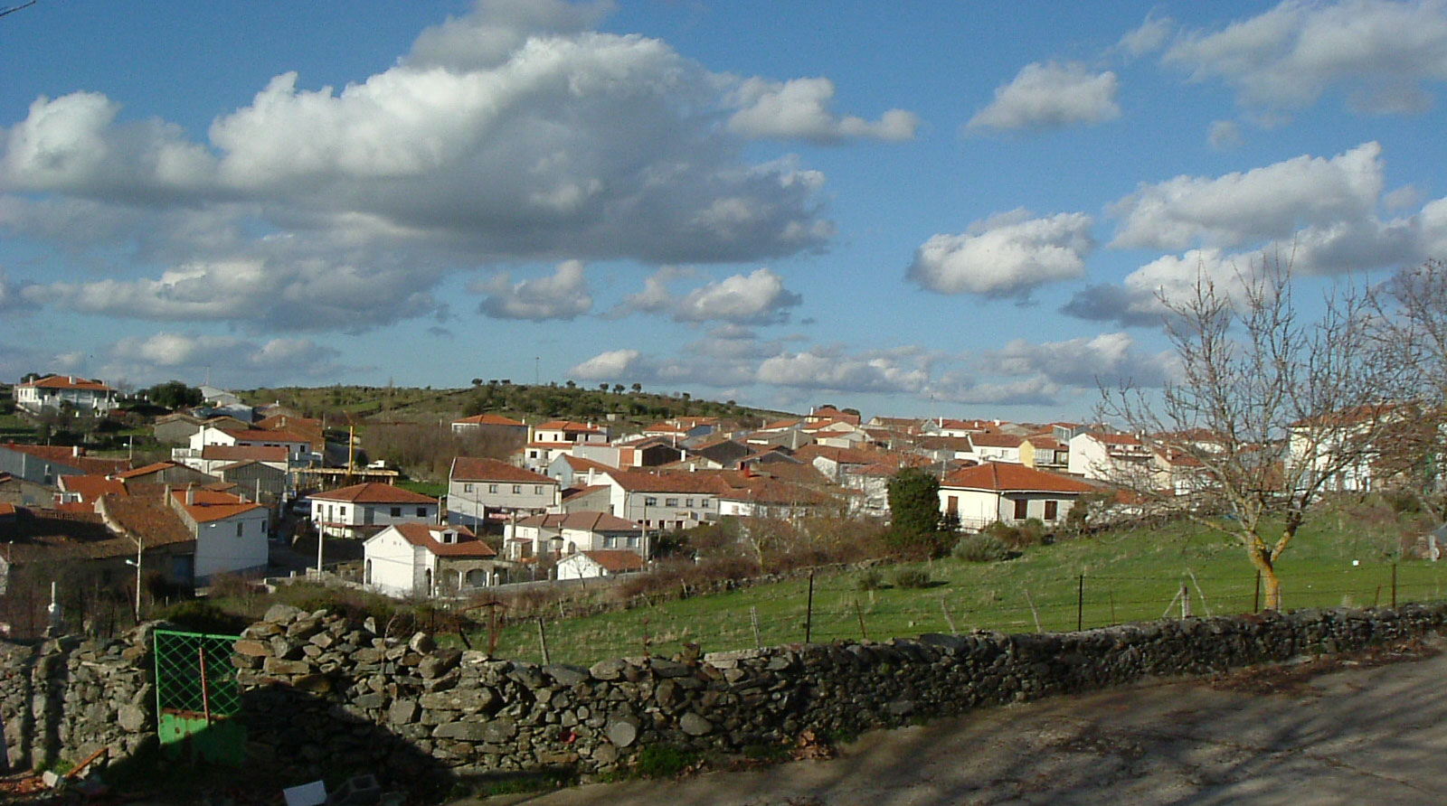 Escurial de la Sierra (Salamanca) Vista desde la Iglesia